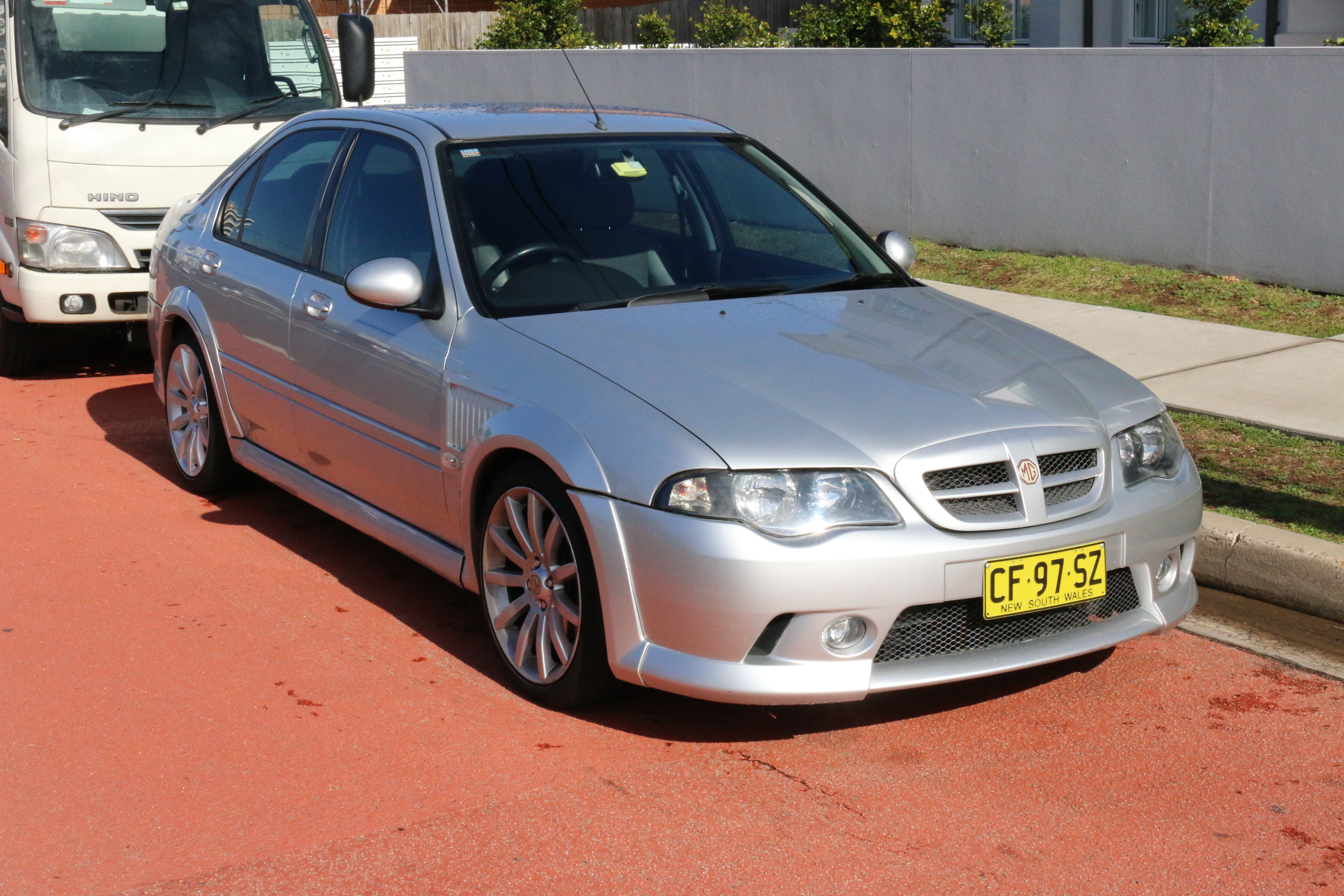 MG ZS 180